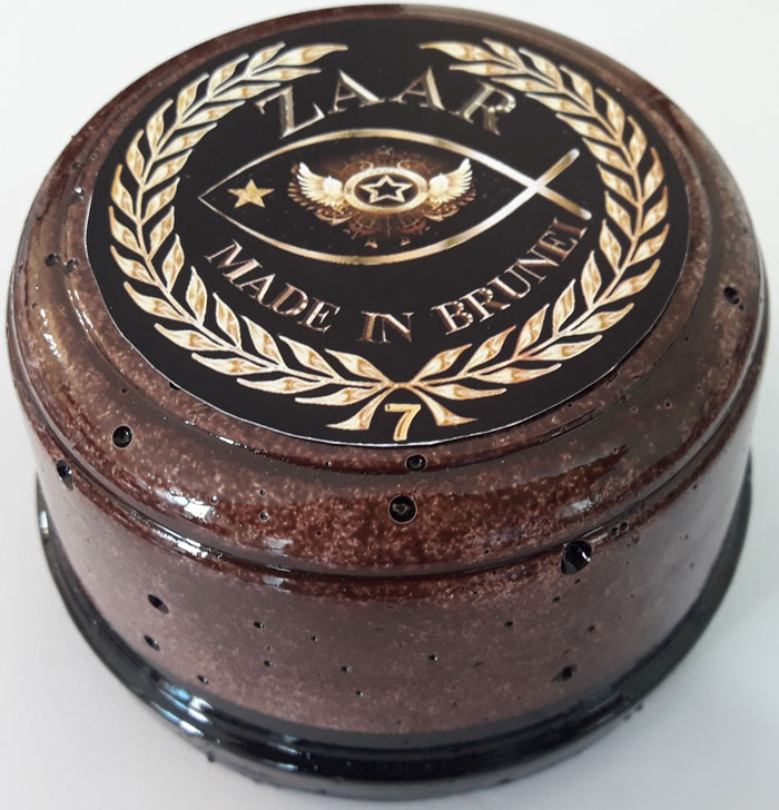 بخور زار دارای خواص بسیاری است و جنبه های درمانی بیشماری از آن یاد شده است که مهمترین آن بهبود فعالیت سلولهای مغز است. بخور زار بالاترین نمونه بخورات در علوم غریبه است.بخور زار در دوران پادشاهی حضرت سلیمان توسط دو فرشته به نام های هاروت و ماروت به بشر آموزش داده شده است. بخور زار ماده ای دلنشین و دوستداشتنی برای موجودات ماورایی نیکو و کمک کننده است. بخور زار را بخور عشق و محبت یا بخور تسخیر هم میگویند.بخور زار در کشوری کوچک و مسلمان بنام کشور برونئی تولید میشود و نمونه بخور دست ساز به شمار میرود